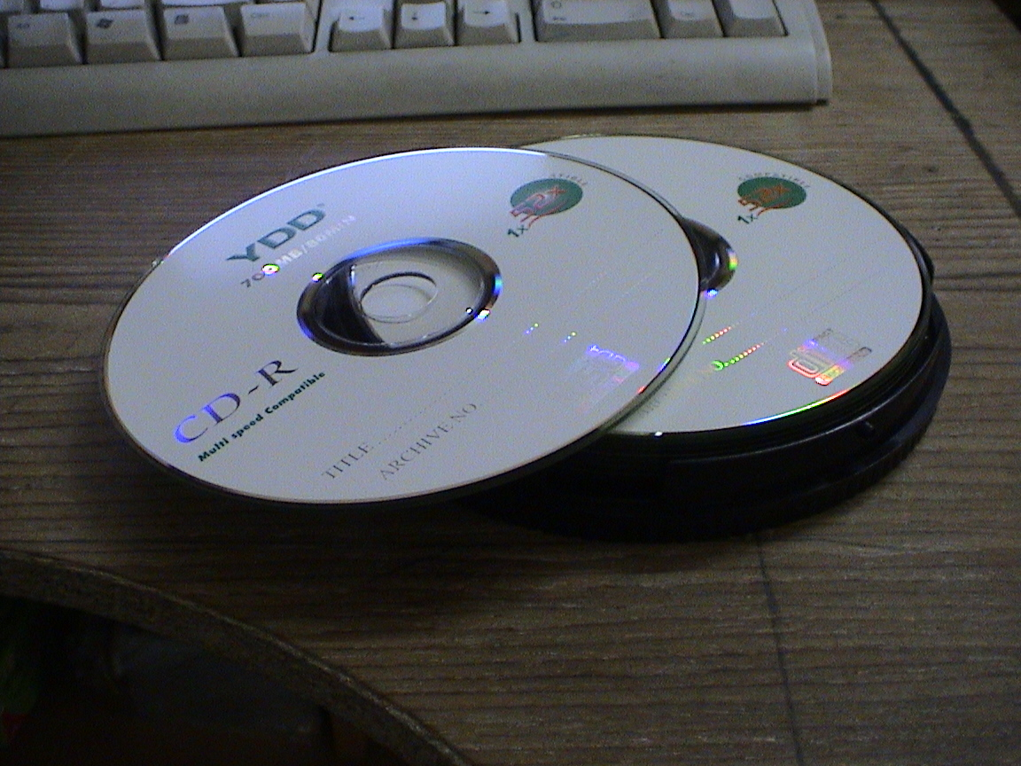 CDR. Mamun2a 10:13, 4 September 2006 (UTC)